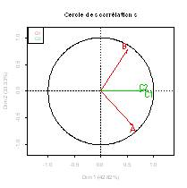 AFM. Données test. Représentation des variables.